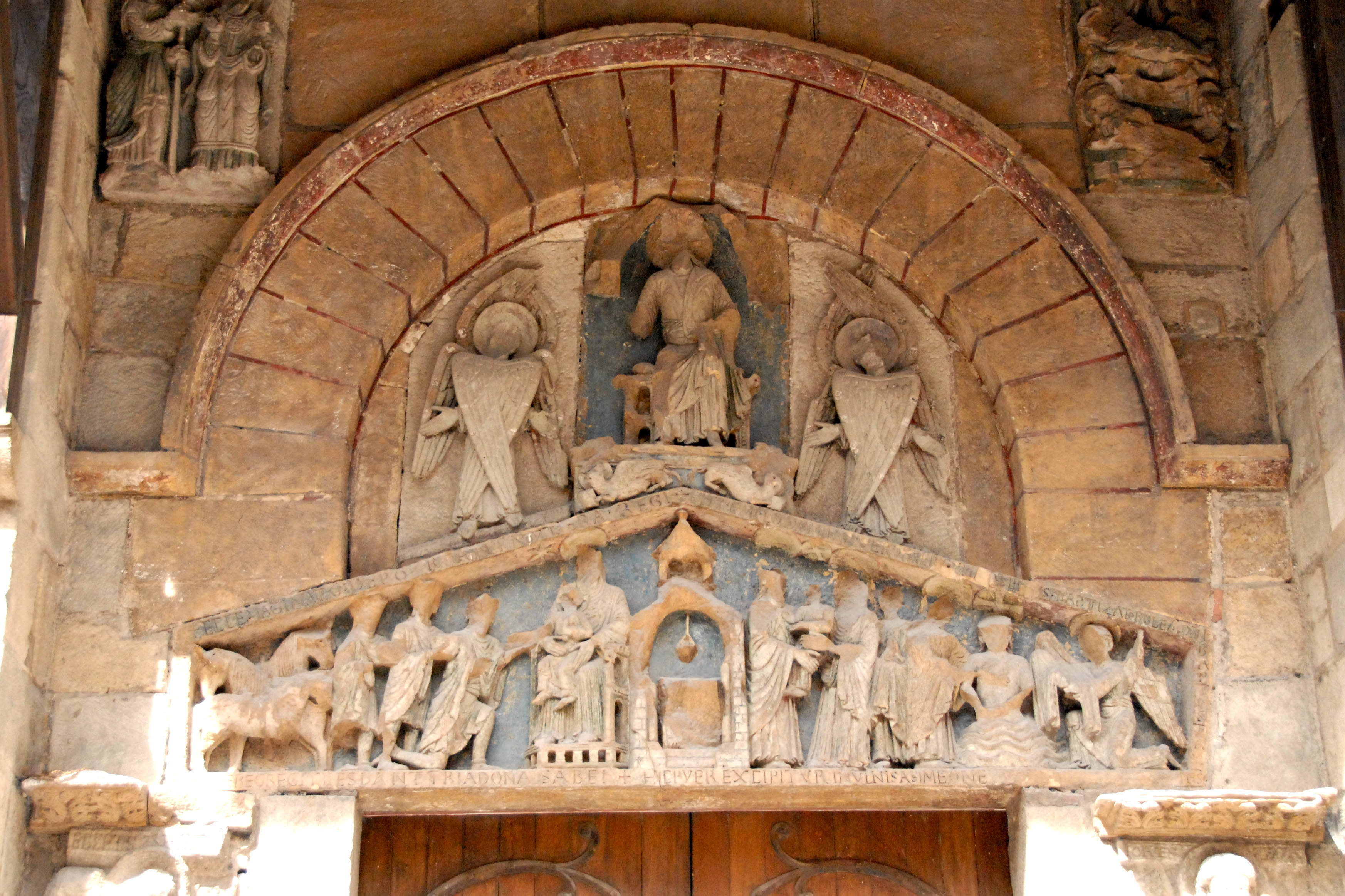 Notre-Dame du Port, Südportal, Tympanon und Sturz